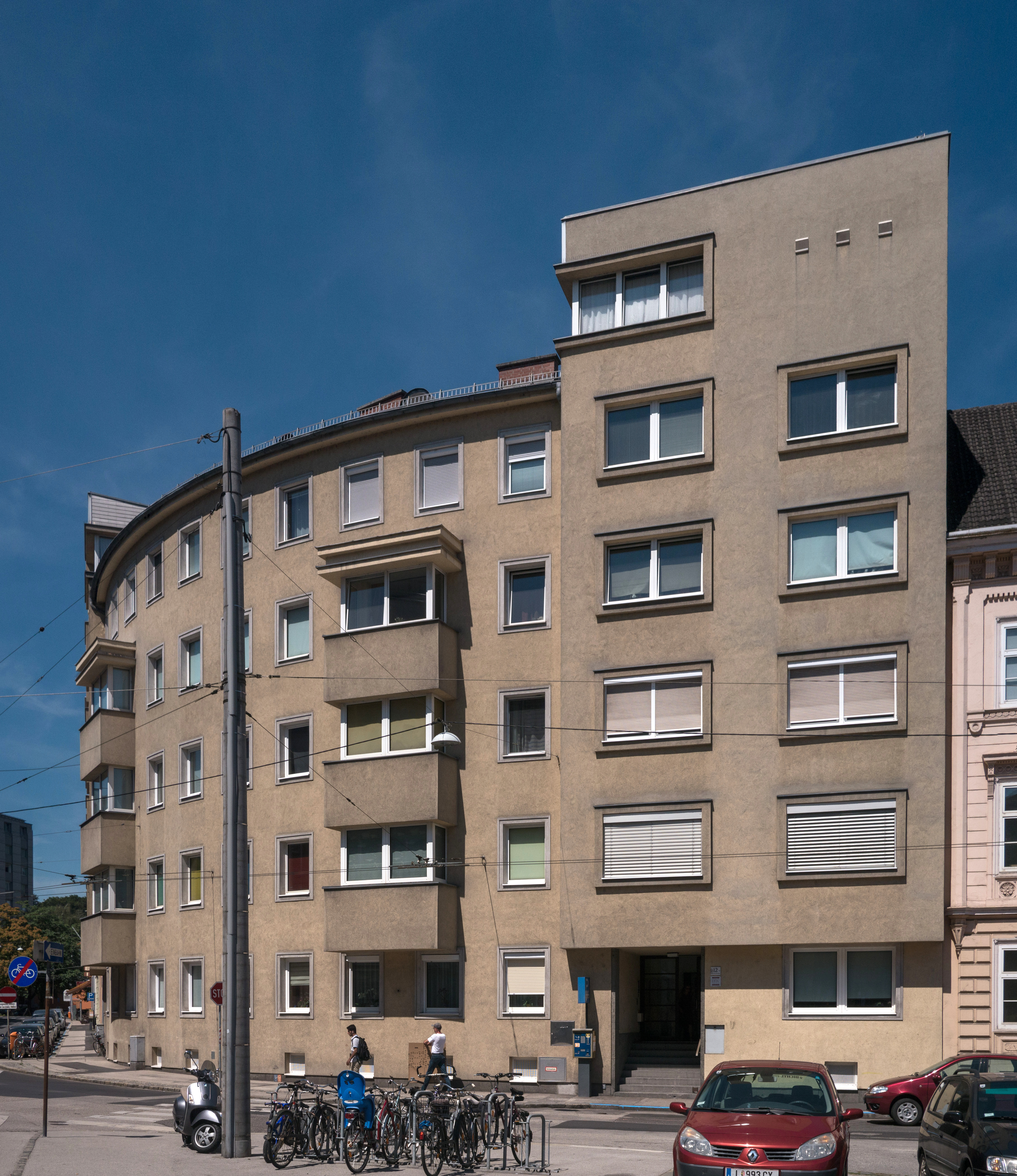 Wohnhaus Linz Gärtnerstraße 12